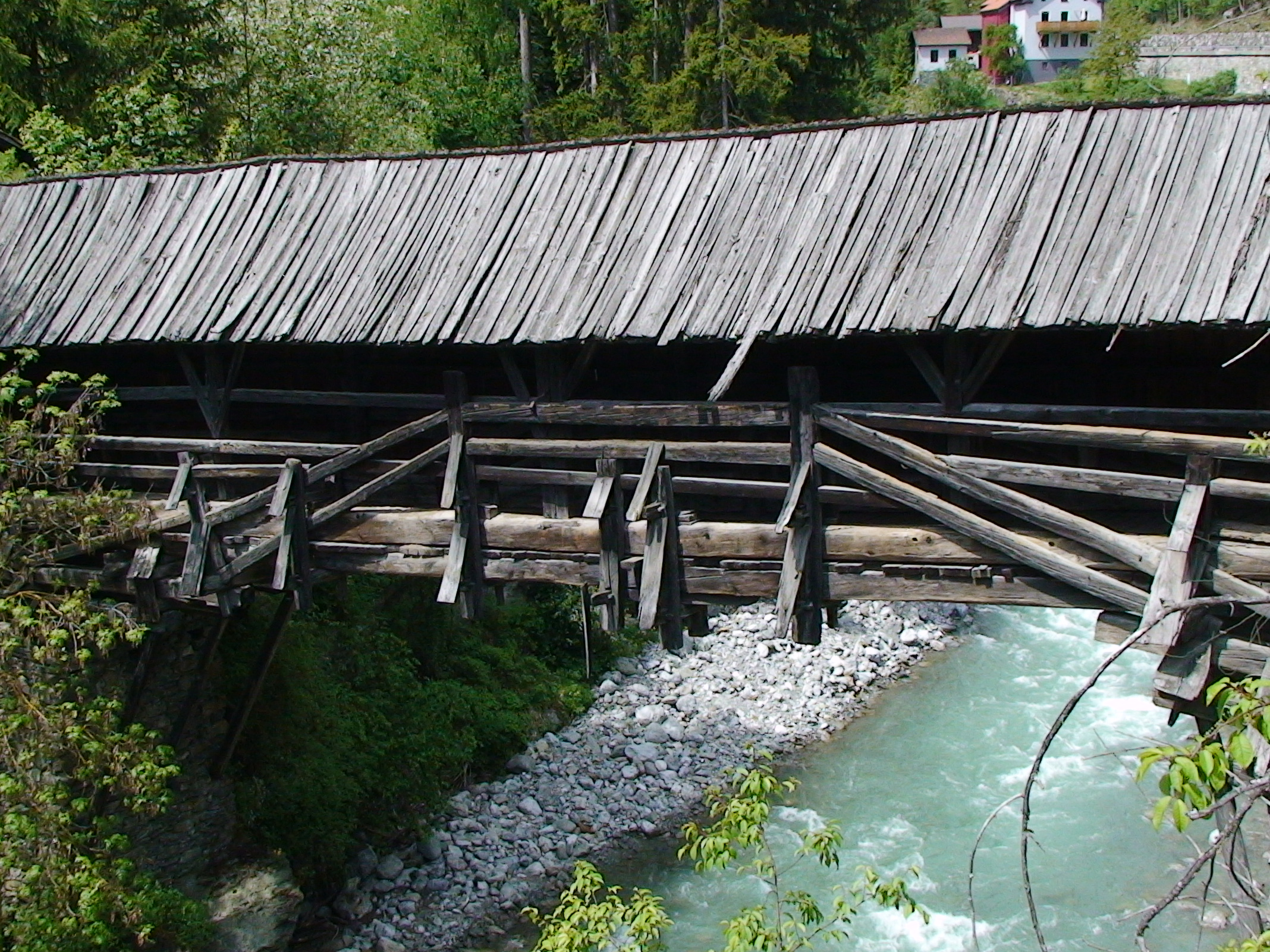 Straßenbrücke, Rosannabrücke